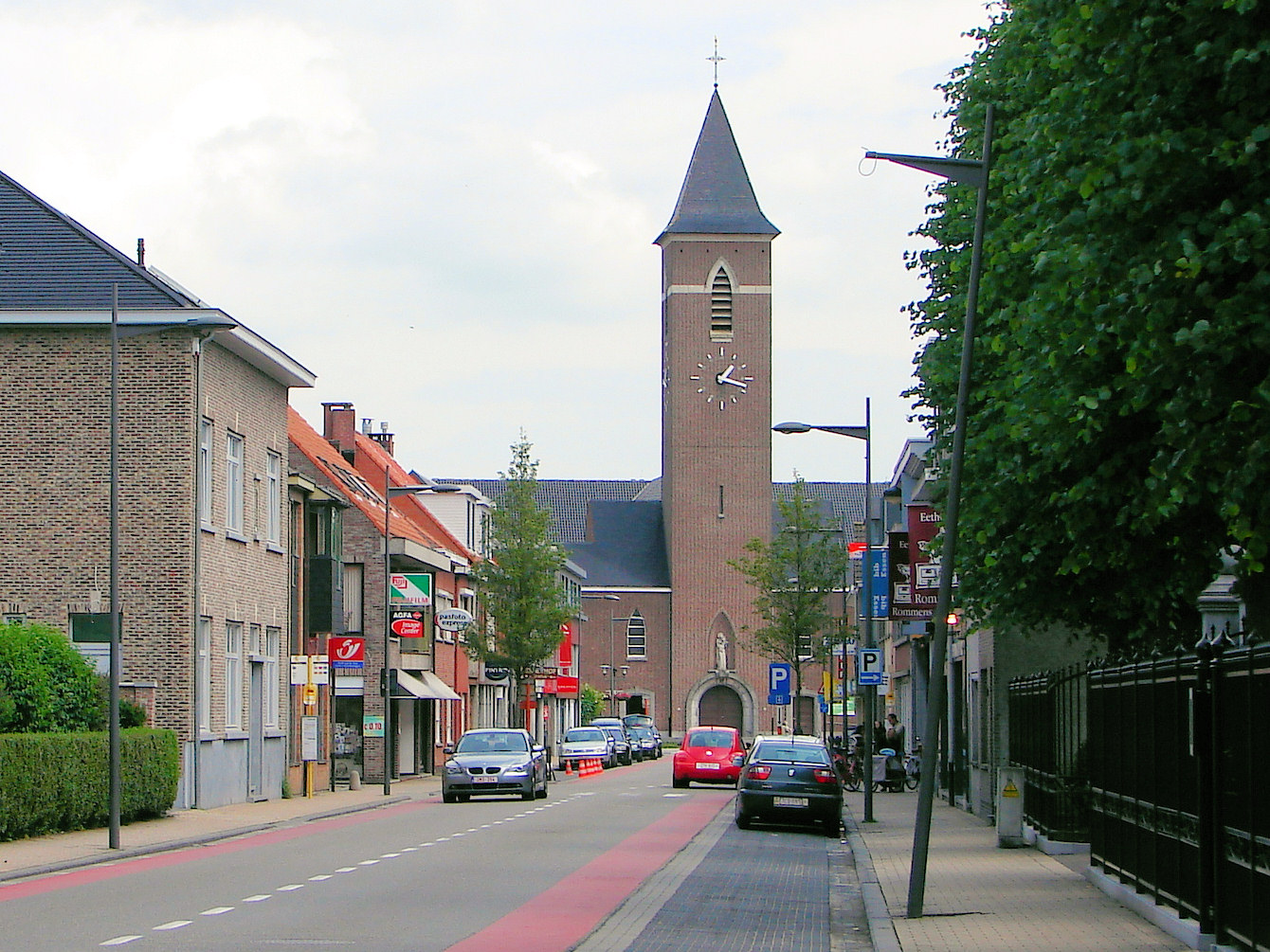 Essen, Antwerp Province, Belgium